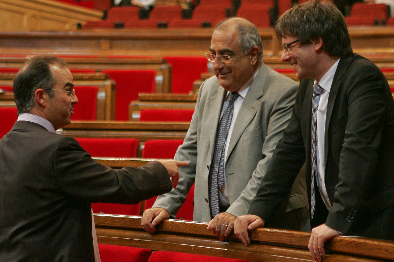 Foto: Parlament de Catalunya (Job Vermeulen)